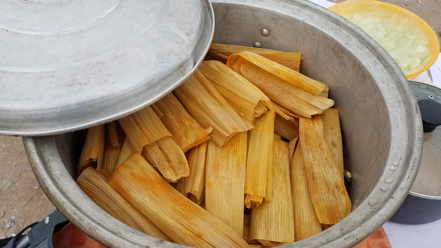 Unos tamalitos norteños en la olla, en una calle de Reynosa, México